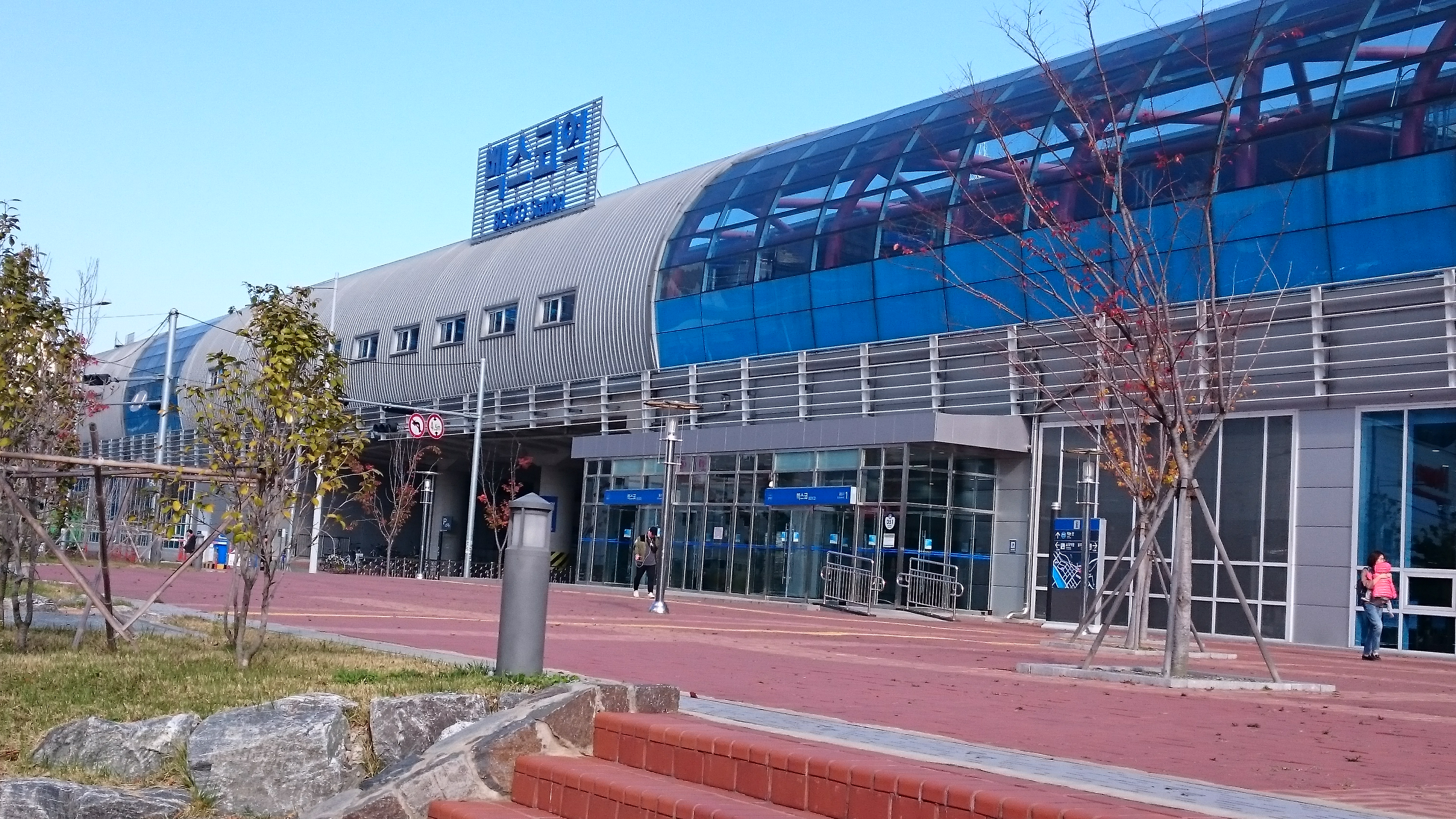 KORAIL BEXCO駅舎